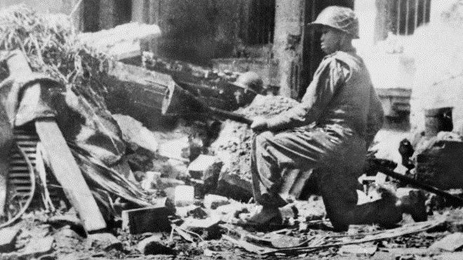 Chiến-sĩ cảm-tử Liên-khu I Nguyễn-văn-Thiềng (Trần-Thành) ôm bom-ba-càng chặn chiến-xa Pháp tại phố Hàng-Đậu tháng 12 năm 1946.